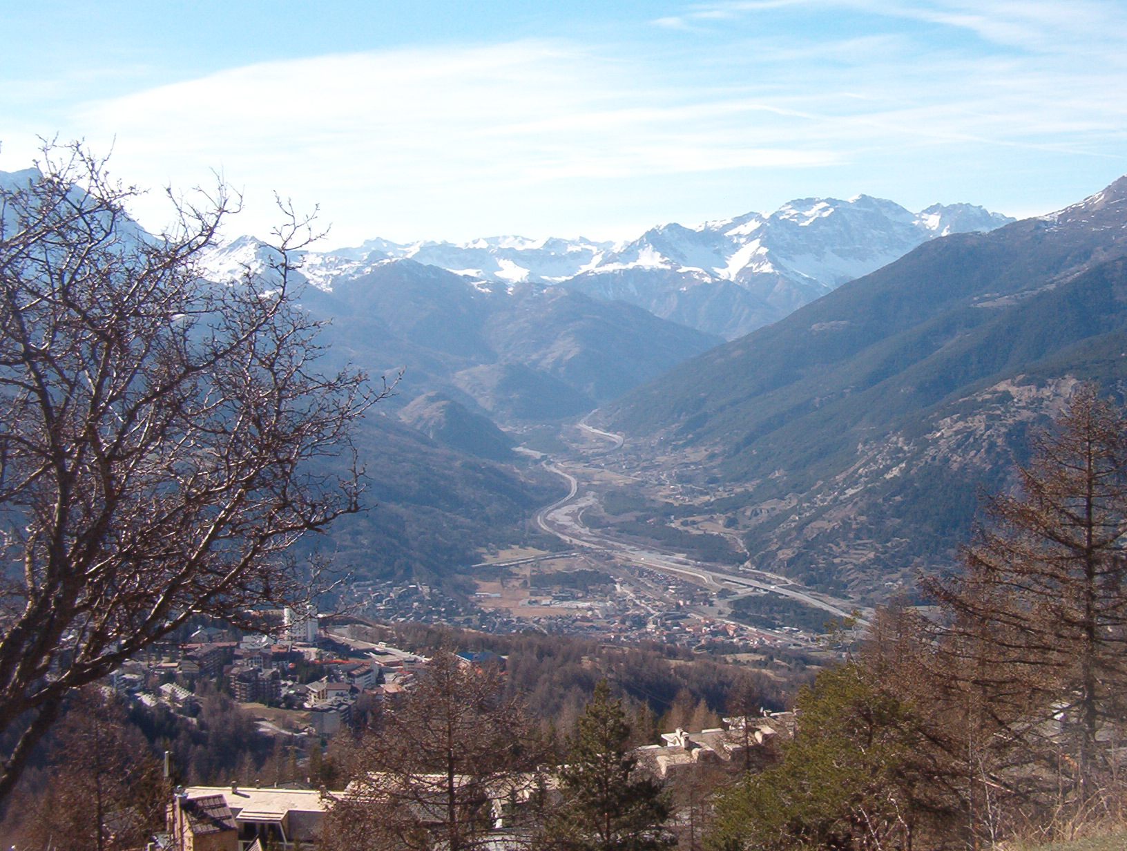 Alta Val di Susa - Piemonte - Italia